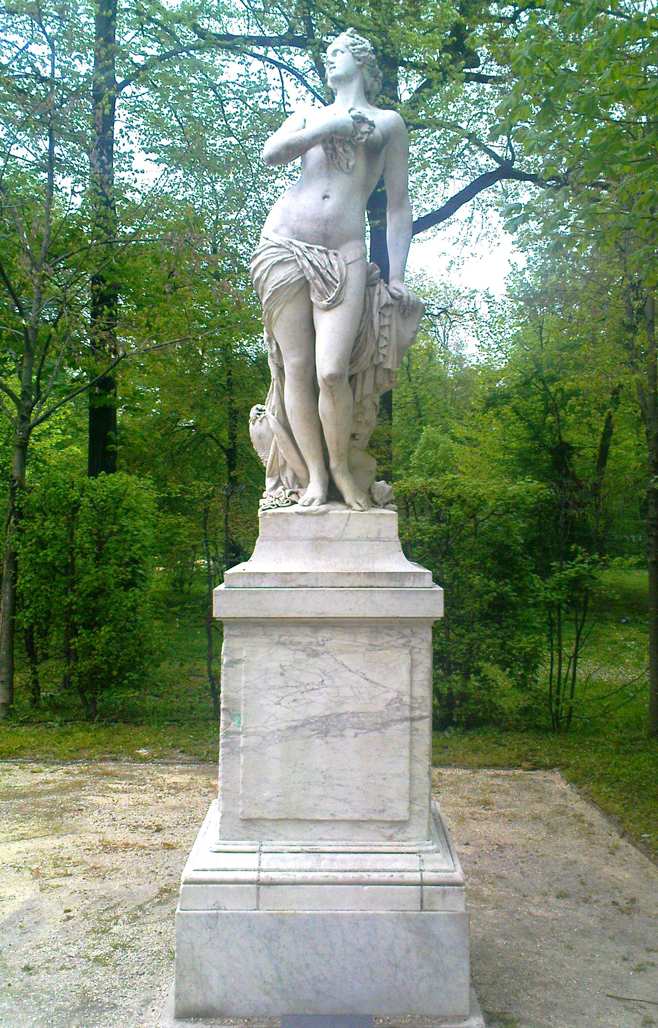 Parco Ducale di Parma; Statua di Arianna (Jean Baptiste Boudard, 1753).